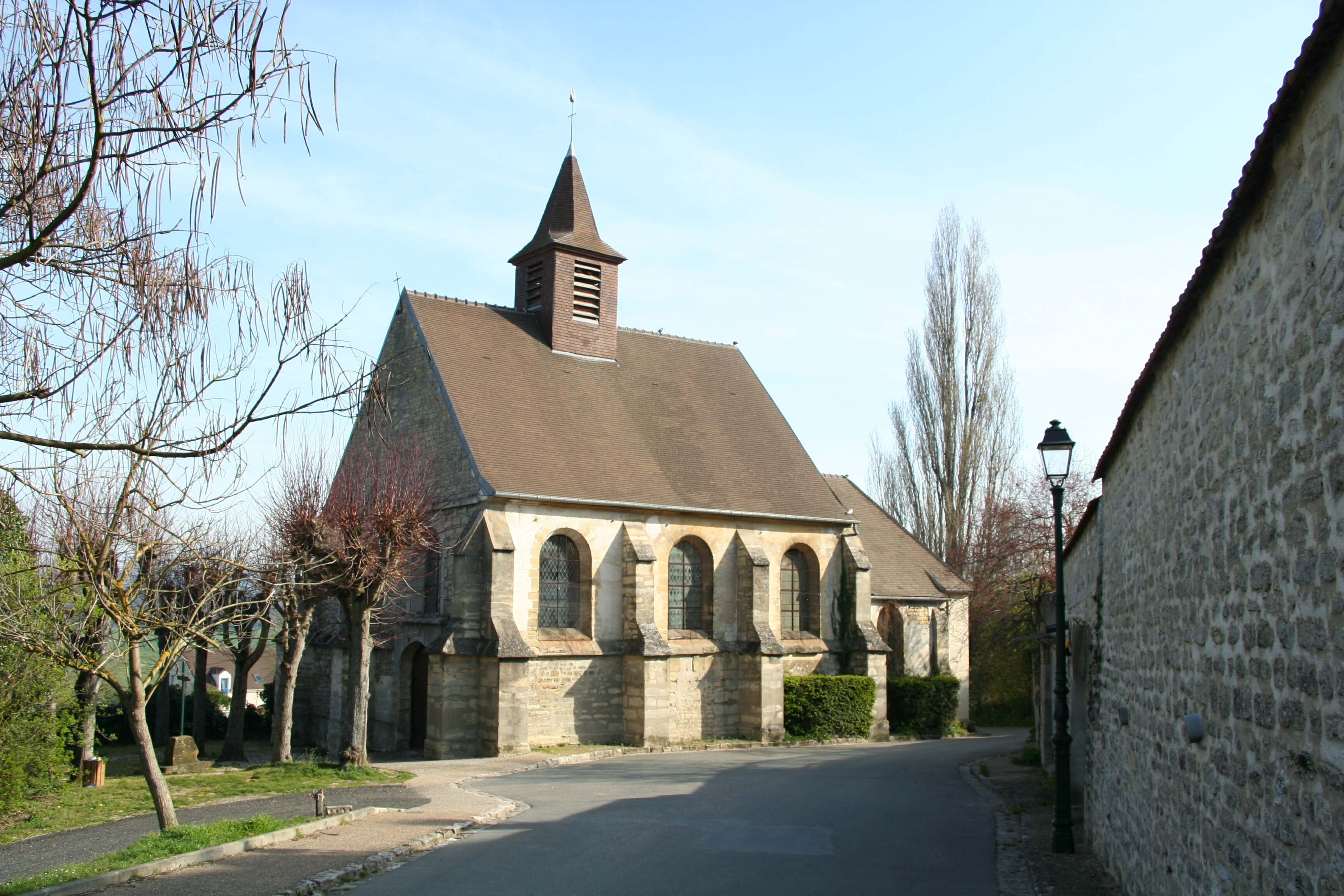 Église de Chapet - Yvelines (France)